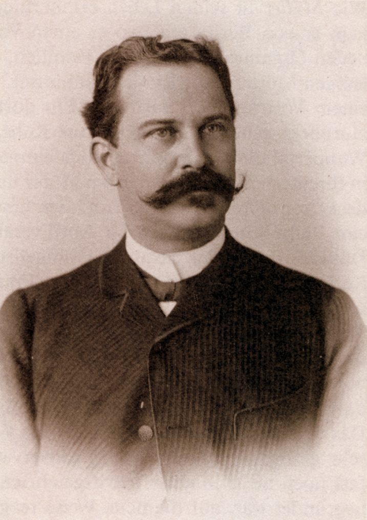 Der Barmer Fabrikant Alexander Erbslöh (1854-1917) erwarb 1892 das Haus Rauenthal (heute zu Wuppertal) sowie 1902 das Schloss Mainberg (bei Schweinfurt)